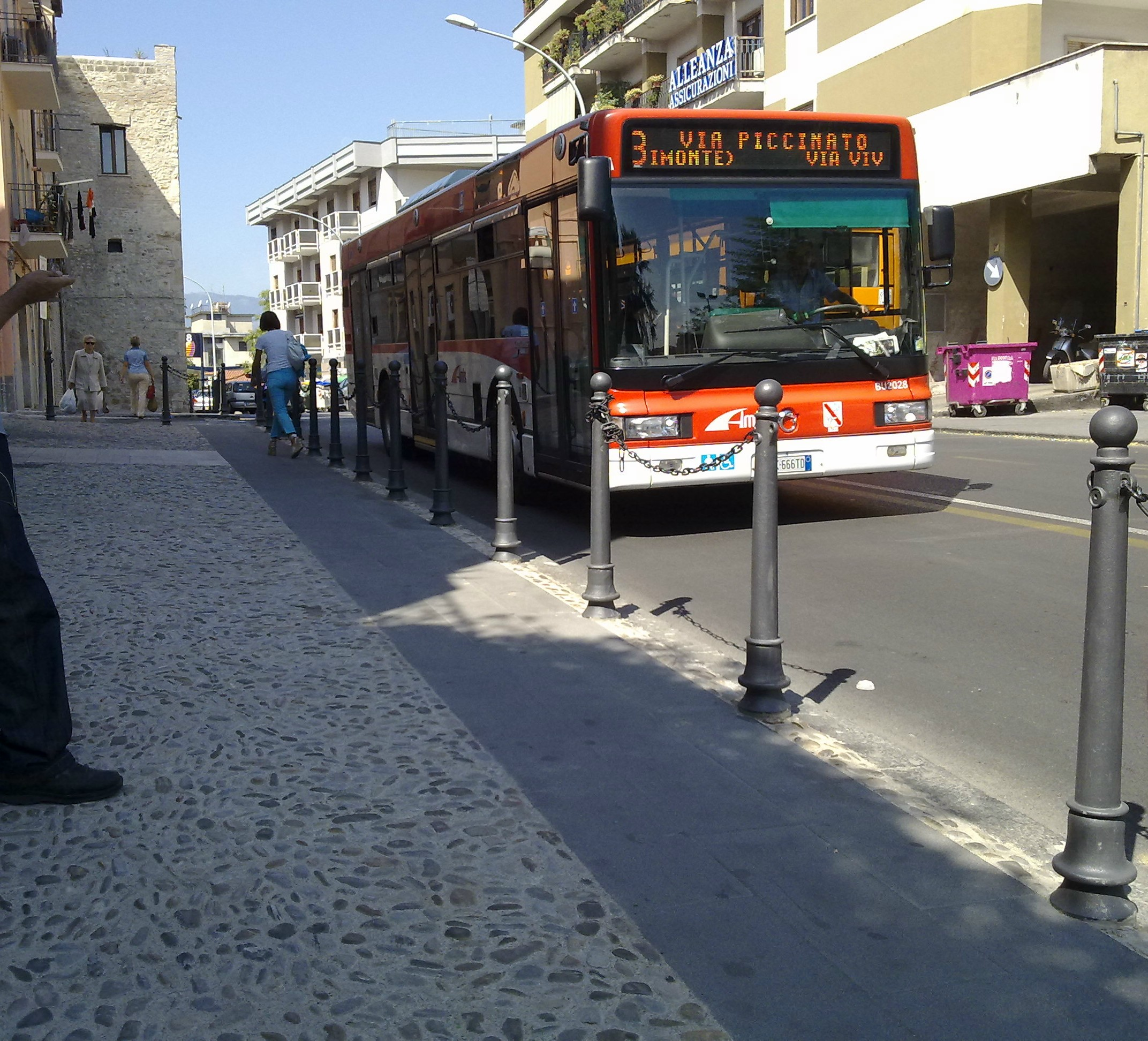 Foto di un autobus Irisbus CityClass a Benevento